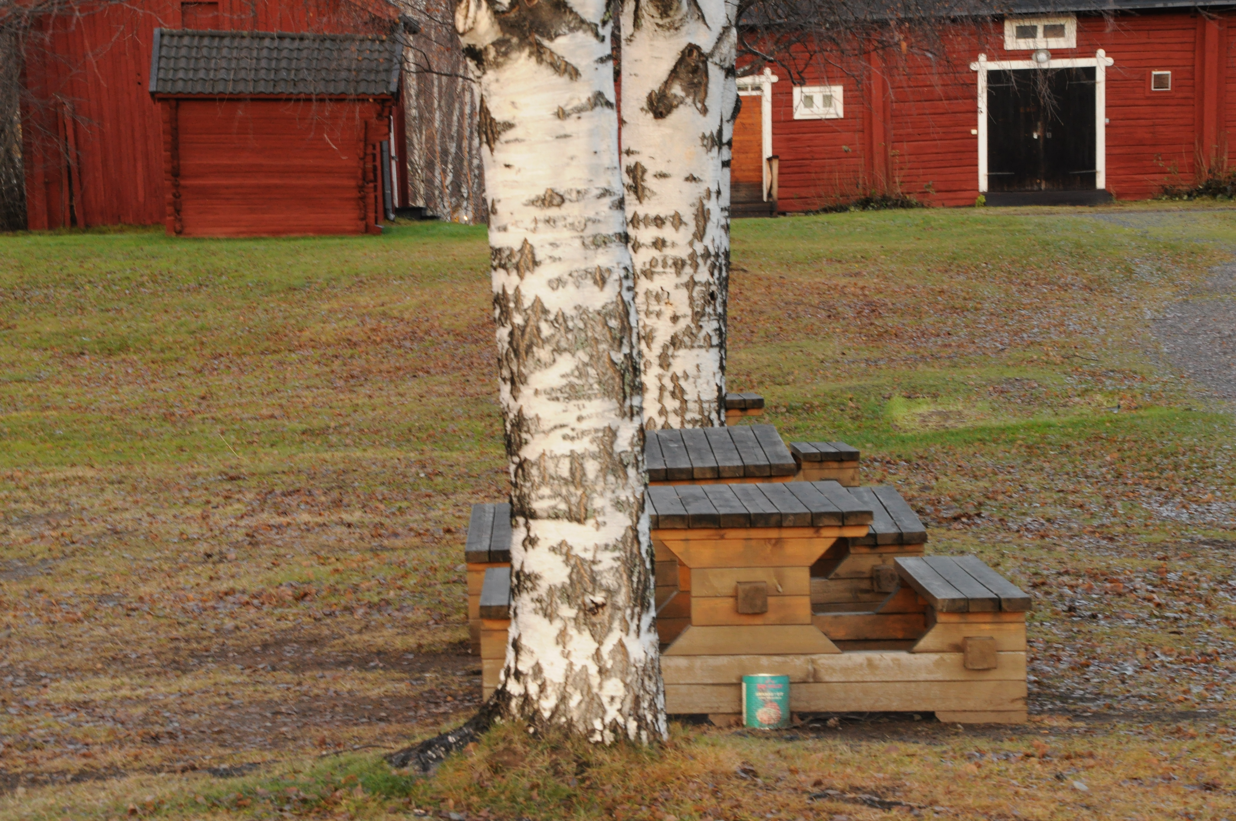 Träbänk, björkar och röda stugor i Nordanå, Skellefteå